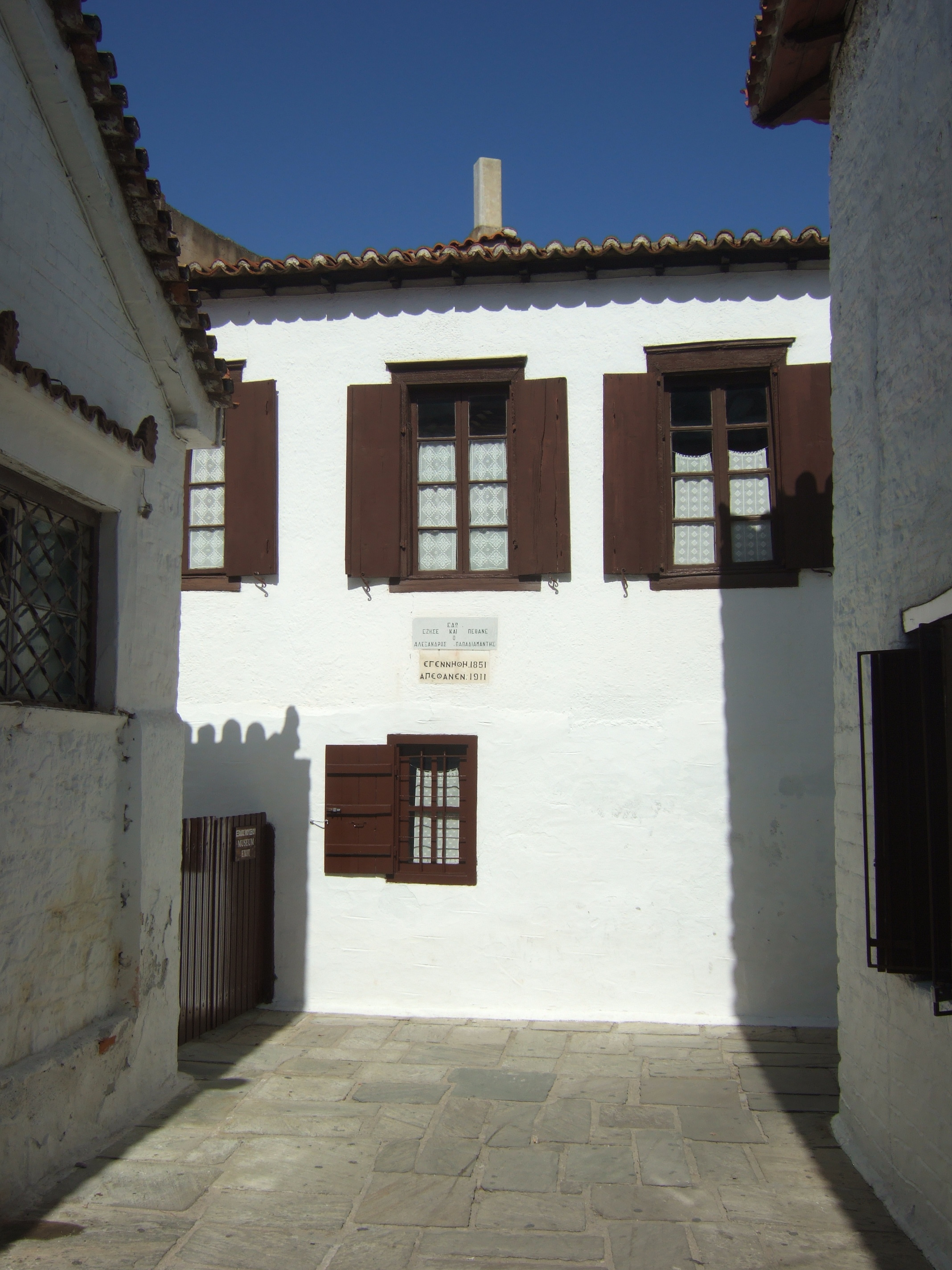 Οικία - Μουσείο Αλέξανδρου Παπαδιαμάντη«Οικία - Μουσείο Αλέξανδρου Παπαδιαμάντη»